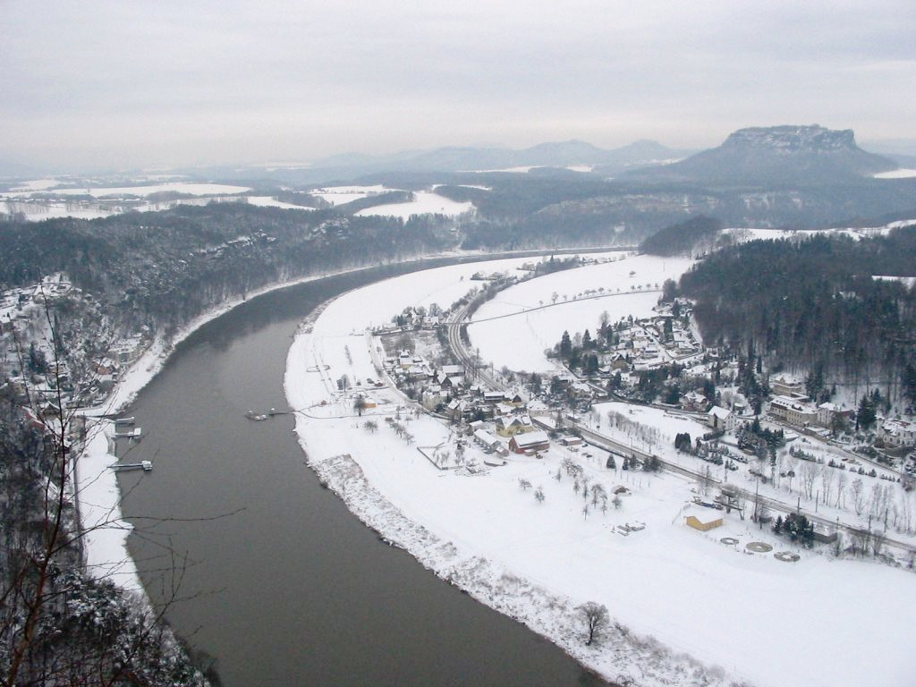 Kurort Rathen, Ortsteil Oberrathen. (Sächsische Schweiz, Deutschland.) Der Fluss ist die Elbe, der Tafelberg rechts hinten der Lilienstein. Aufgenommen von der Bastei. Januar 2005.